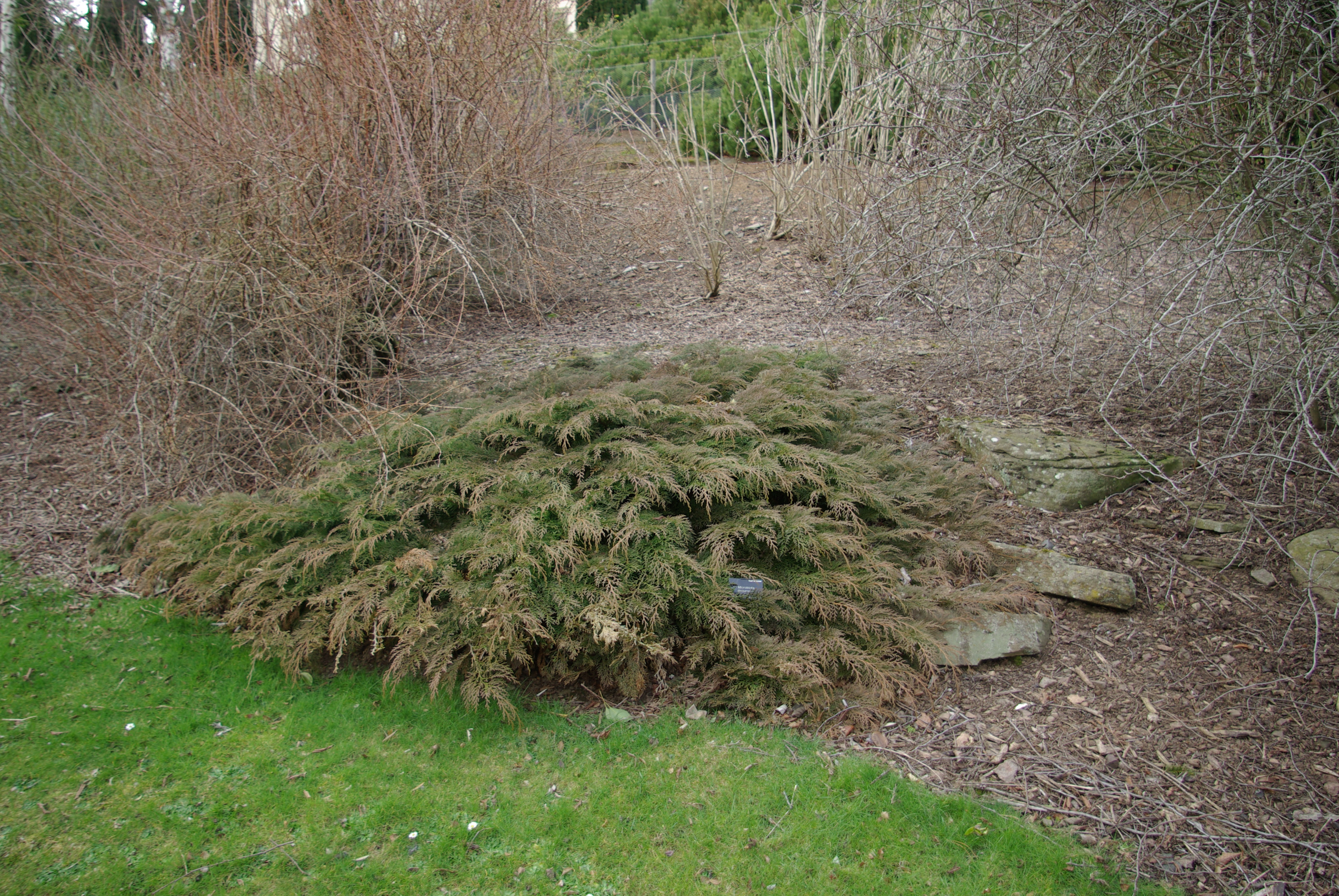 Microbiota decussata (see also Microbiota decussata at Wikispecies